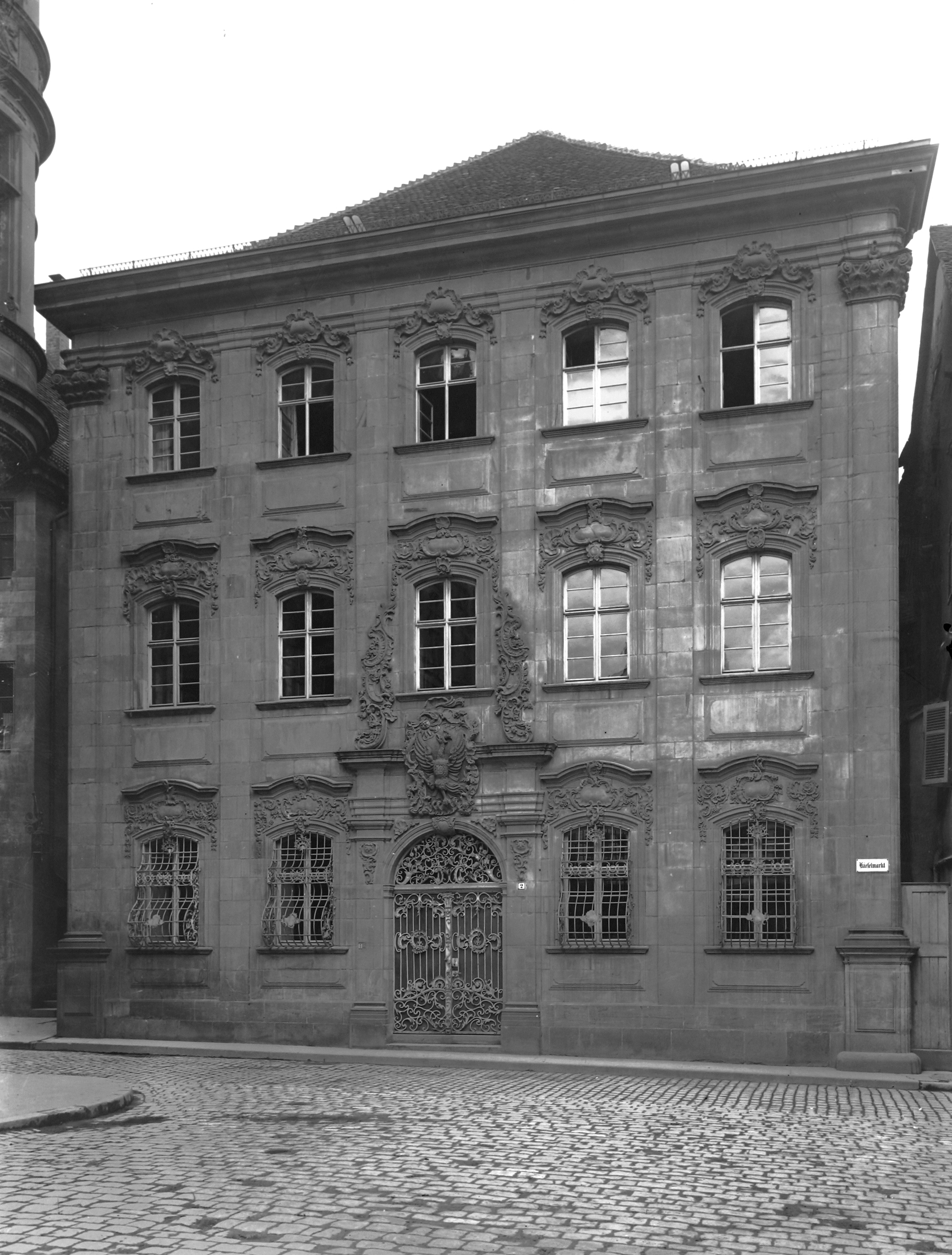 Das alte Gebäude des Stadtarchivs Heilbronn am Kieselmarkt. Die Ruine des im Zweiten Weltkrieg zerstörten Gebäudes dient heute als Heilbronner Ehrenhalle.